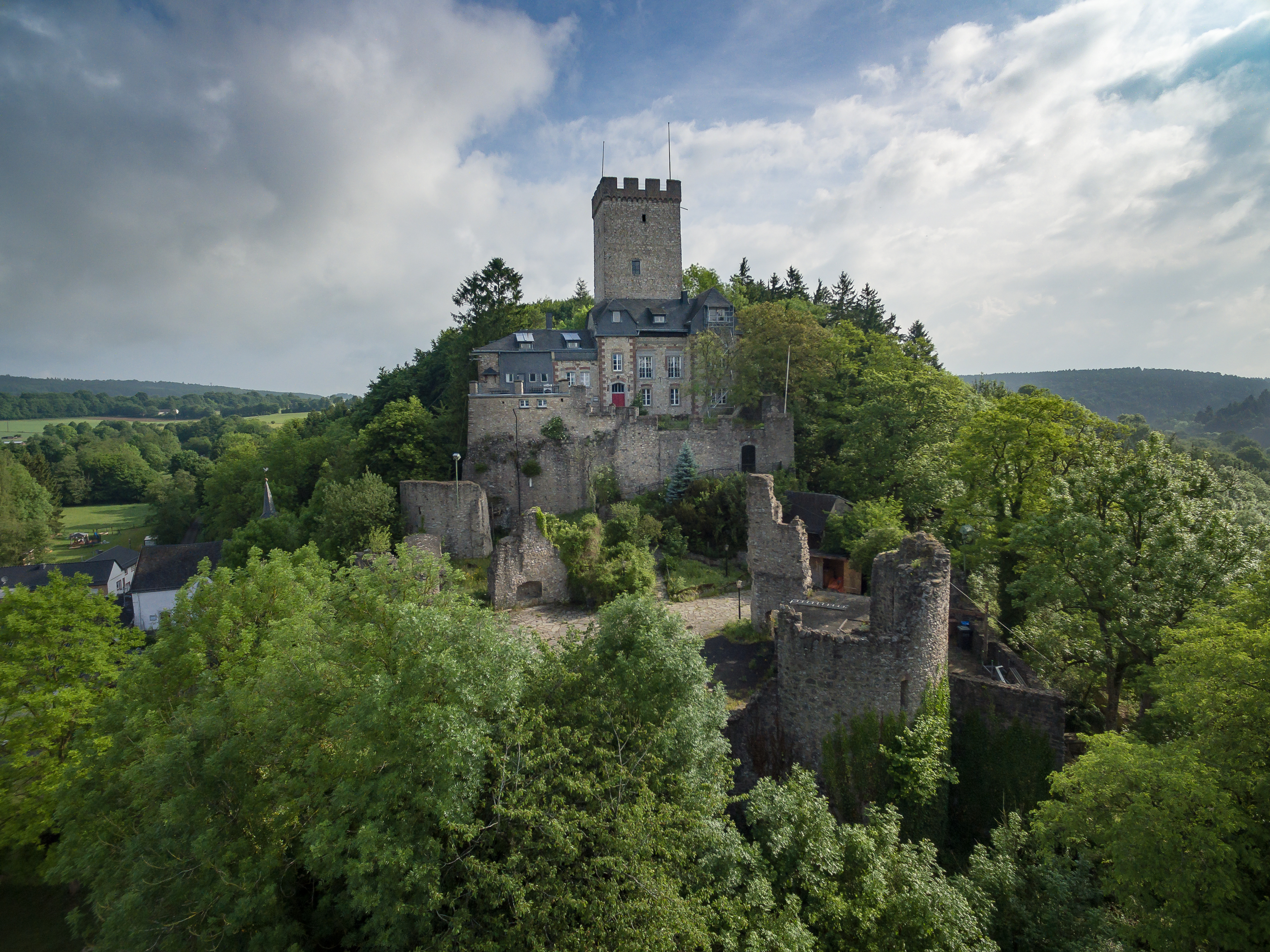 Burg Kerpen (Vulkaneifel), Aufnahme mit Kameracopter